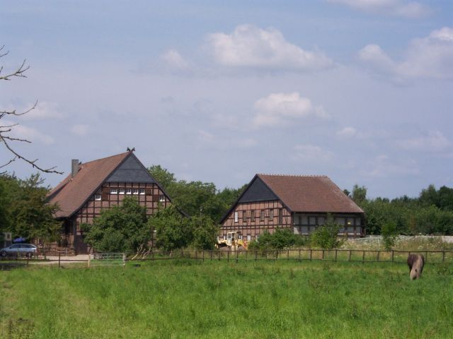 Pferdezucht für Isländer im Münsterland Eigenes Bild